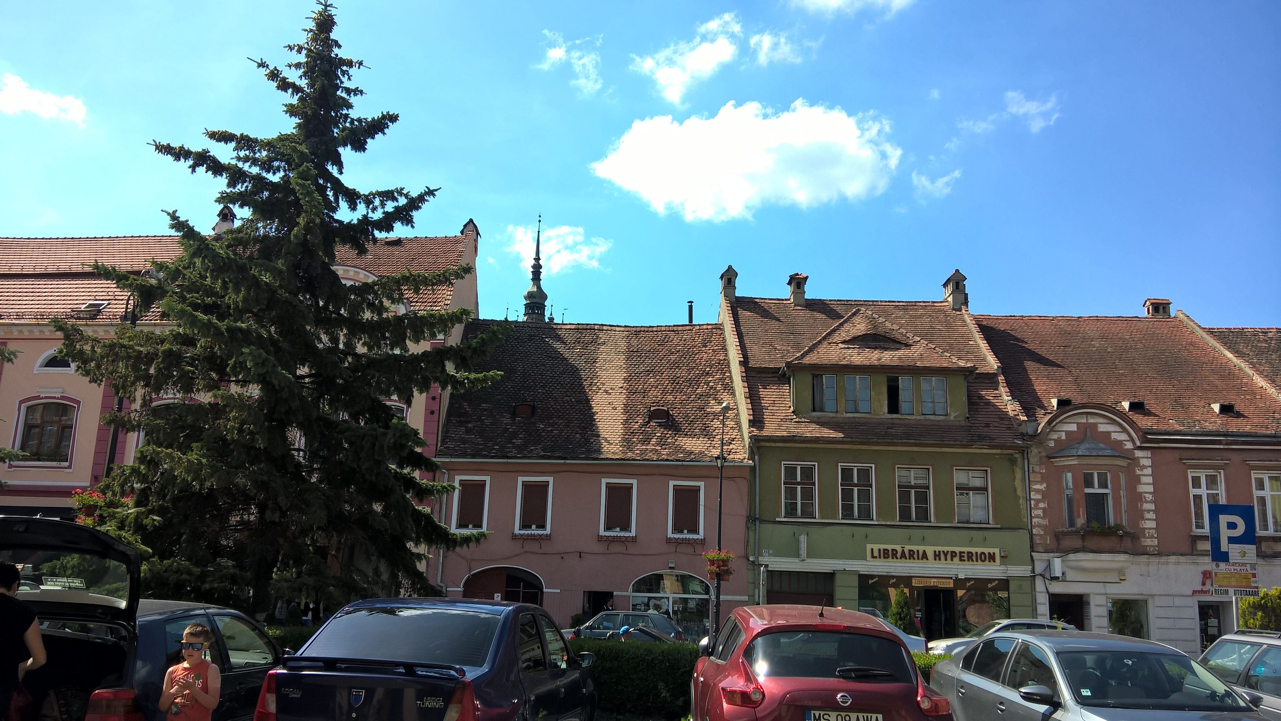 Casă Centrul istoric Sighisoara